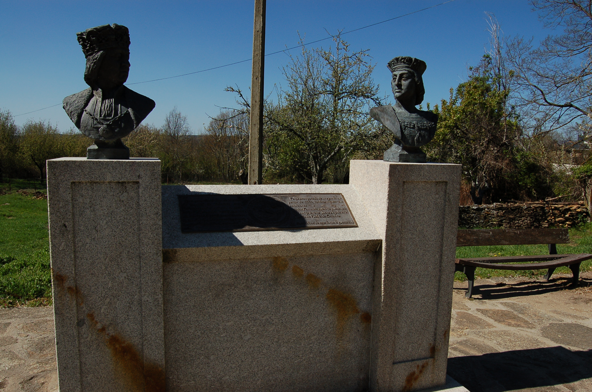 Escultura en Remesal, Palacios de Sanabria, sobre o encontro entre Fernando II de Aragón e Filipe I de Castela